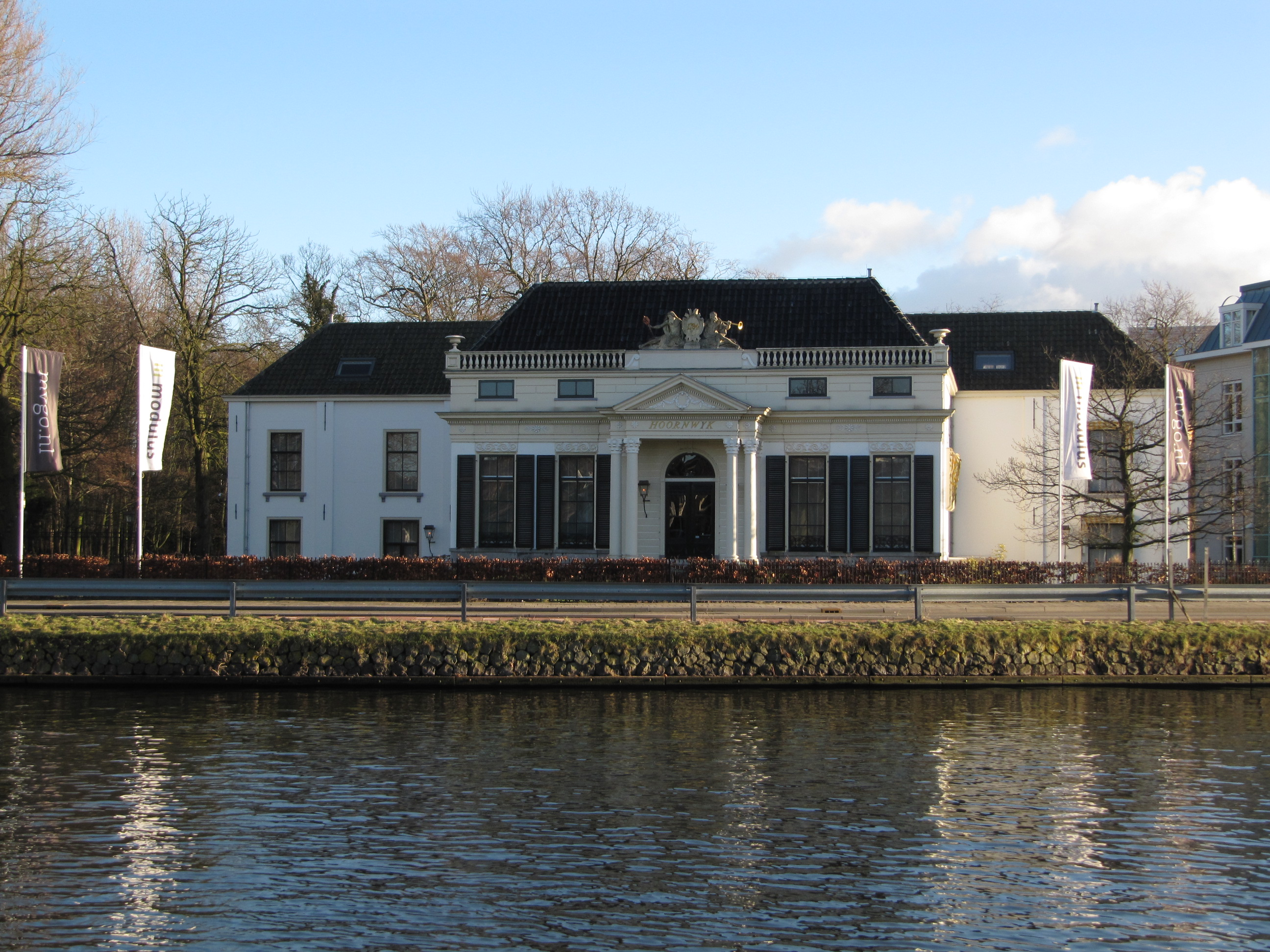 RM20056 Rijswijk - Jan Thijssenweg 2 (Hoornwijck).jpg